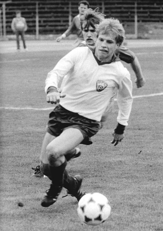 ADN-ZB-Uhlemann-29.4.89-ku-Berlin: BFC Dynamo - Sachsenring Zwickau (1:0).- Der BFC-Spieler Jörg Fügner, verfolgt von Jens Mitzscherling (Sachsenring Zwickau), im Angriff.